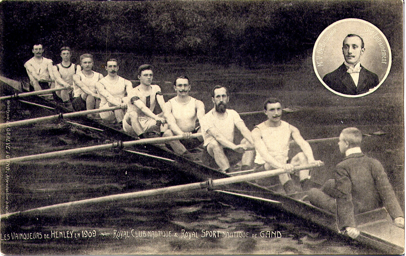 winnaars 1909 - Koninklijke Roeivereniging Club Gent, U. Molmans, G. Visser, St. Kowalski, Rèmy Orban, F. Vergucht, P. Veirman, O. de Somville, M. M. R. Poma (str.), Alfred van Landeghem (cox)